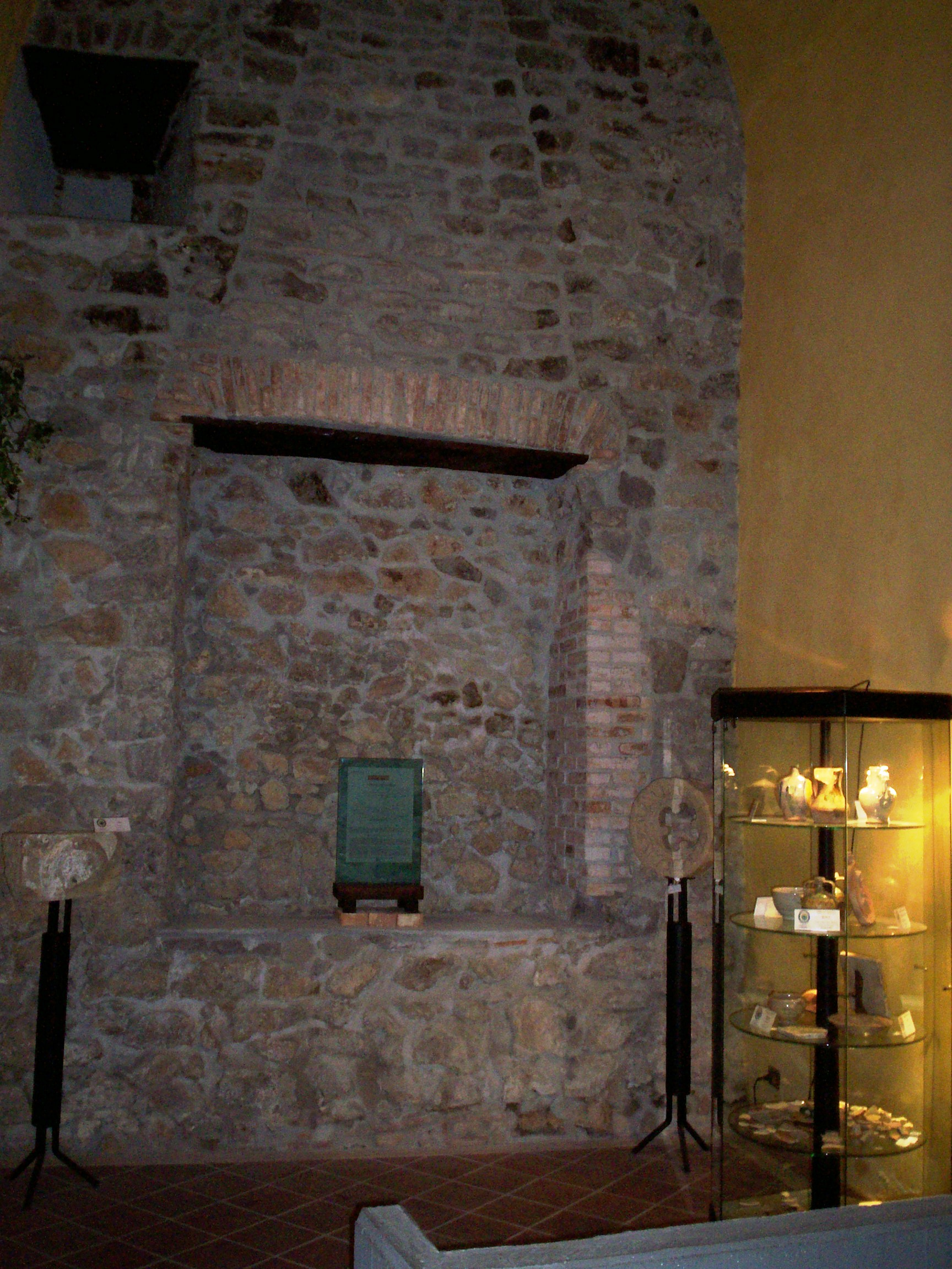 Sala n. 2 del Museo Civico di Cerreto Sannita